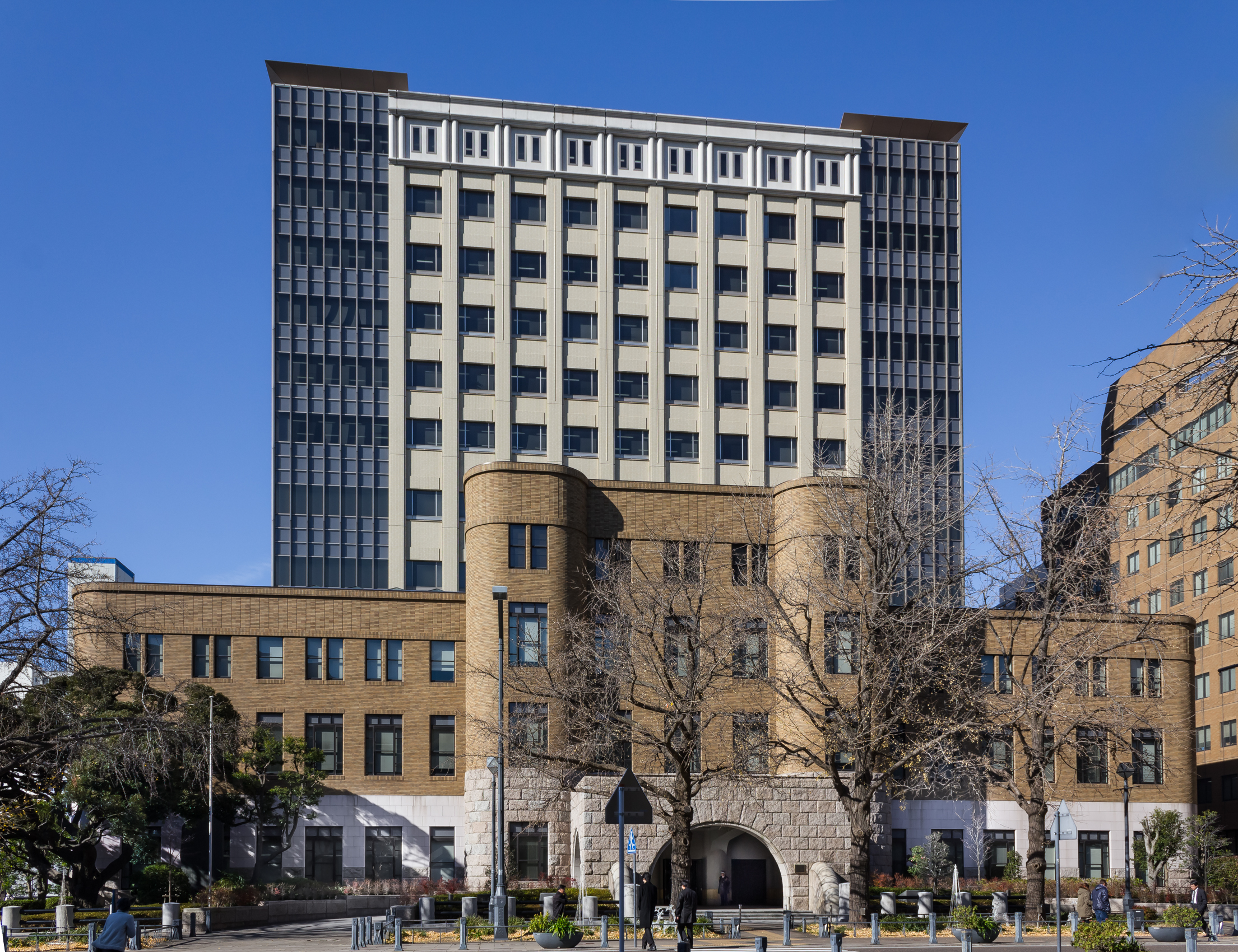 横浜地方裁判所（神奈川県横浜市）